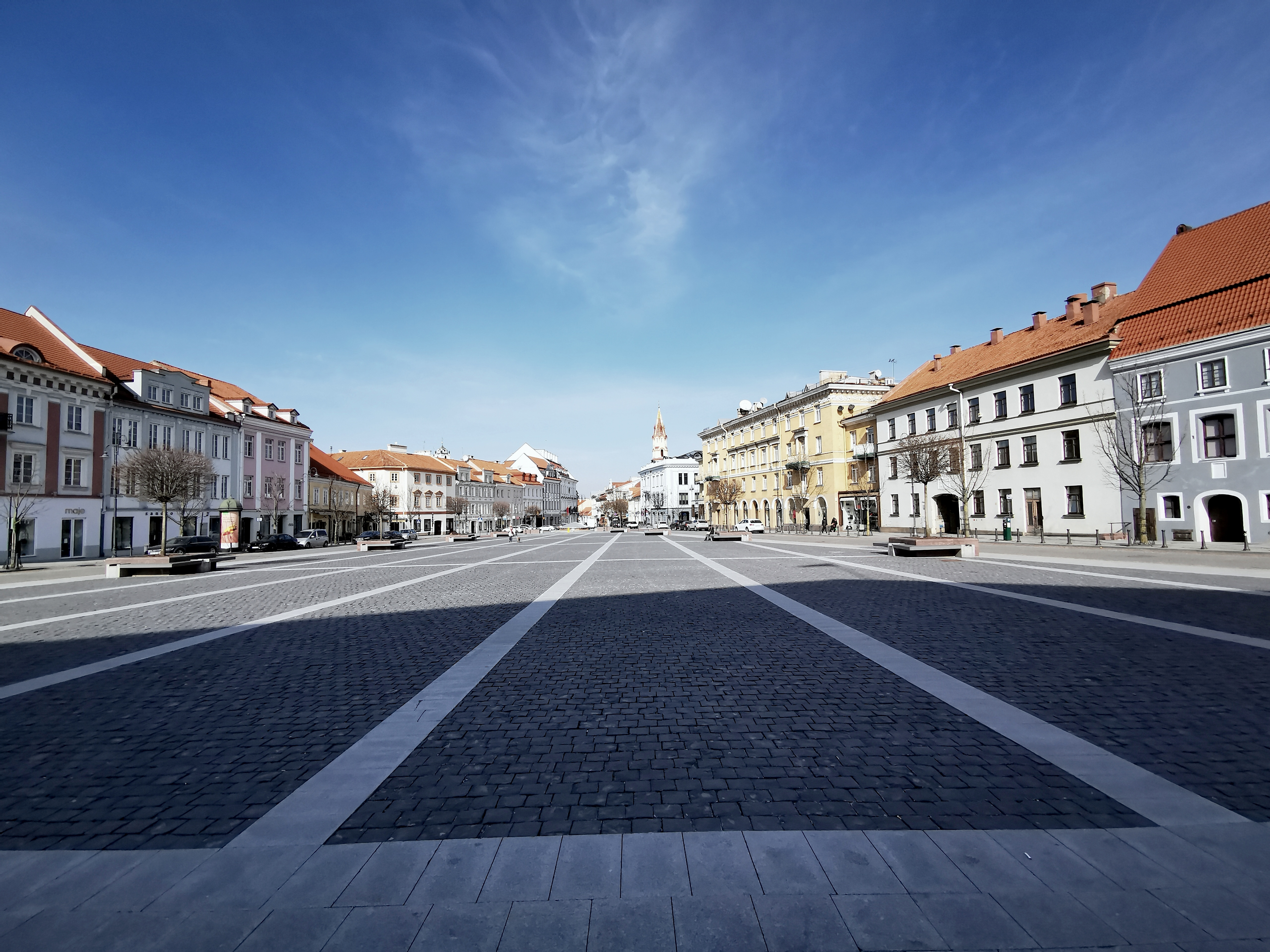 Vilniaus Rotušės aikštė nuo Rotušės